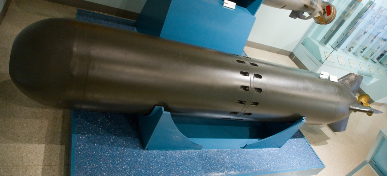 A Mk 34 Torpedo at Kanoya Museum, Japan.